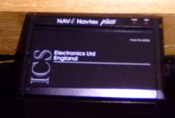 Nav Navtex 4 plus, Gerät mit Drucker